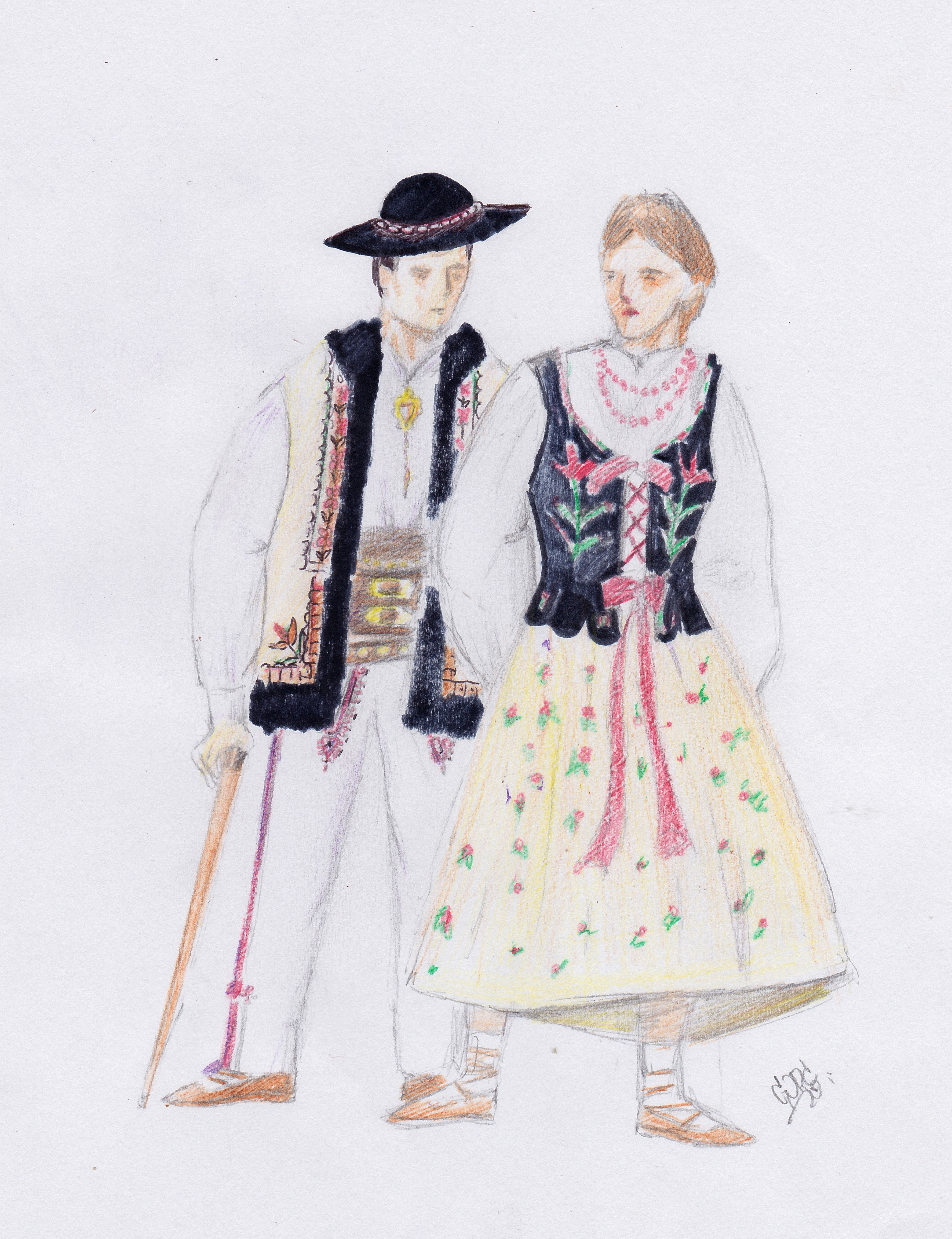 stroj zagorzan